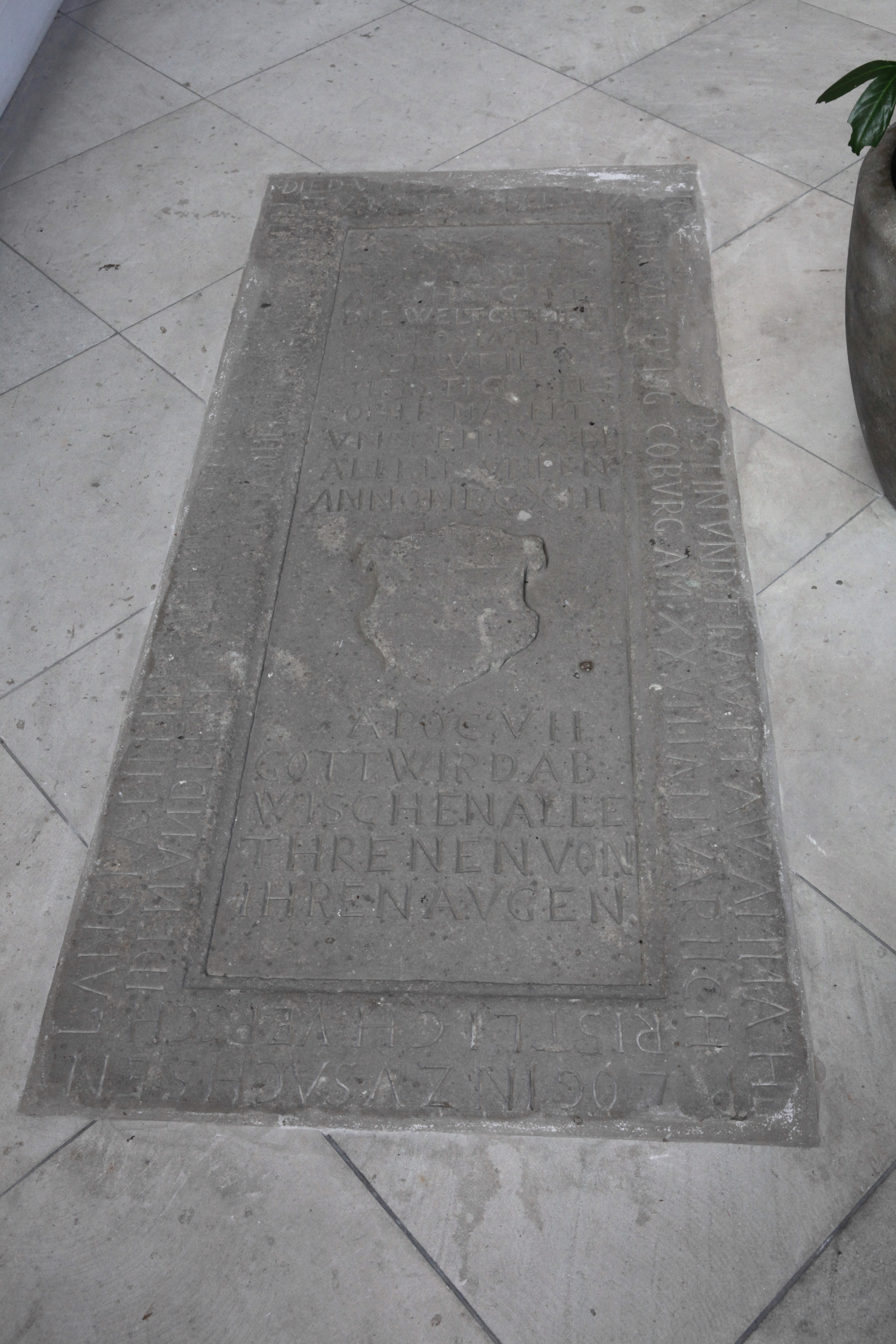 Klosterkirche in Sonnefeld, Landkreis Coburg